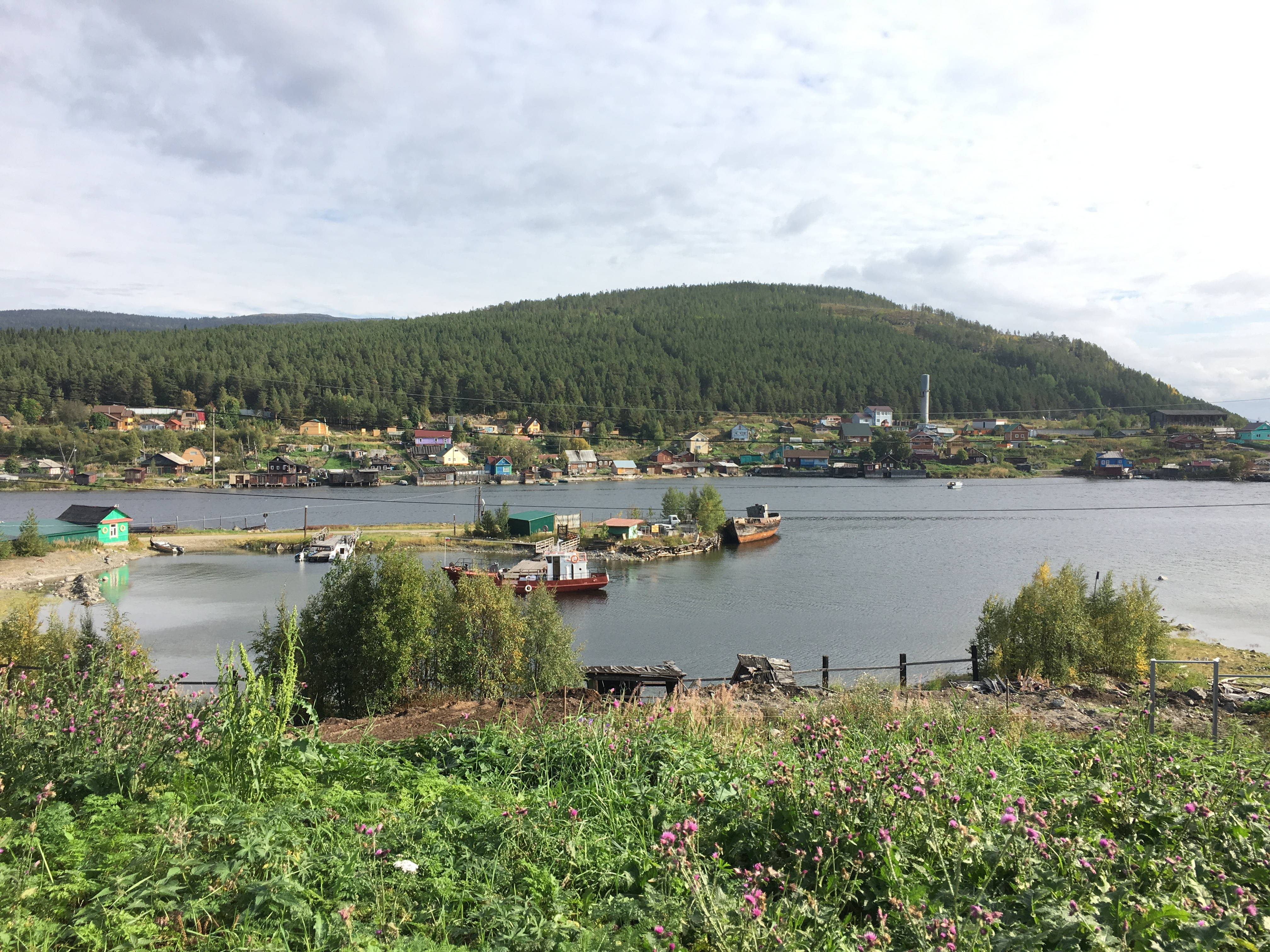 Река Нива, вид на улицу Заречная